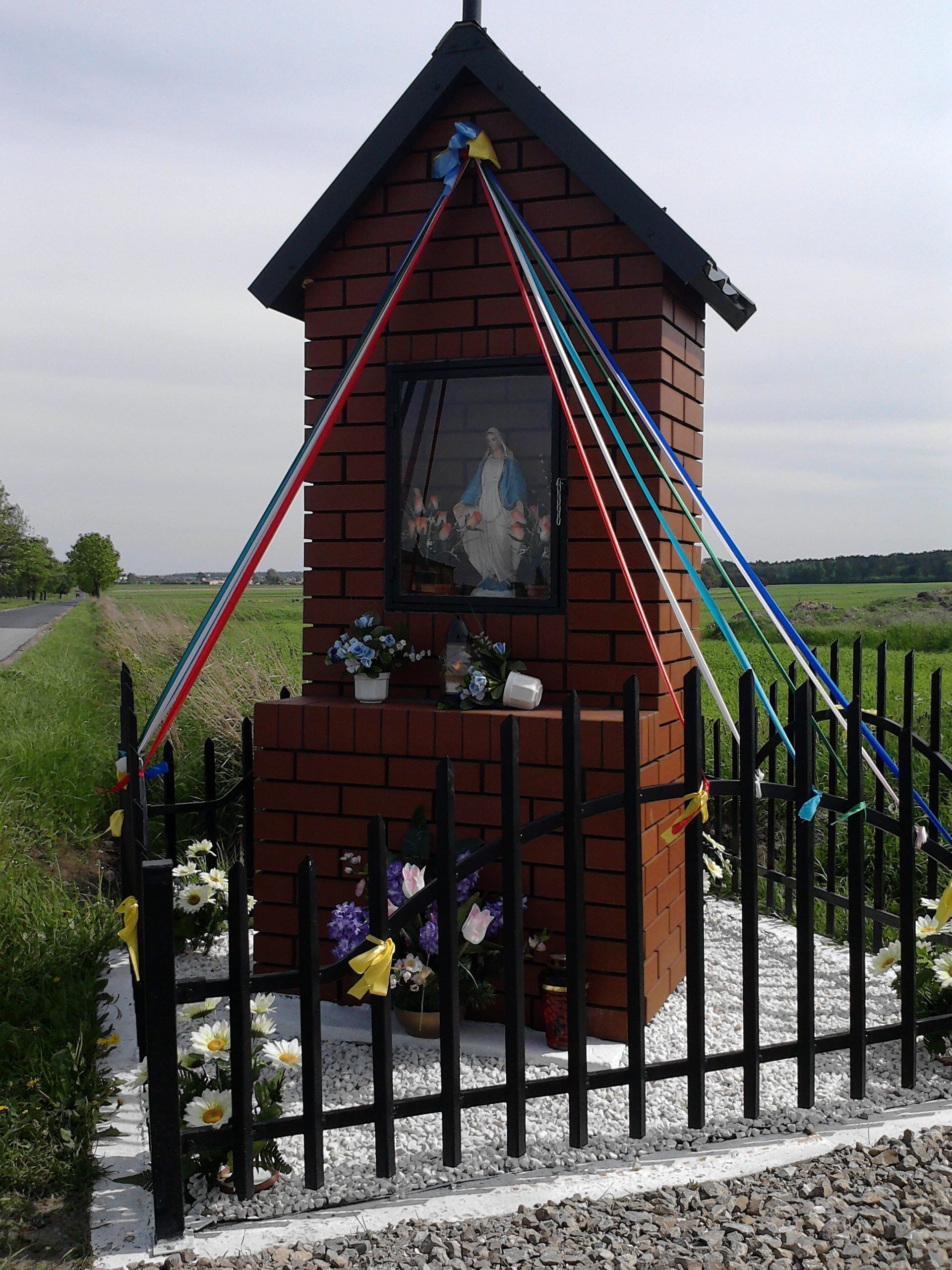 Kapliczka w Gazomii Nowej